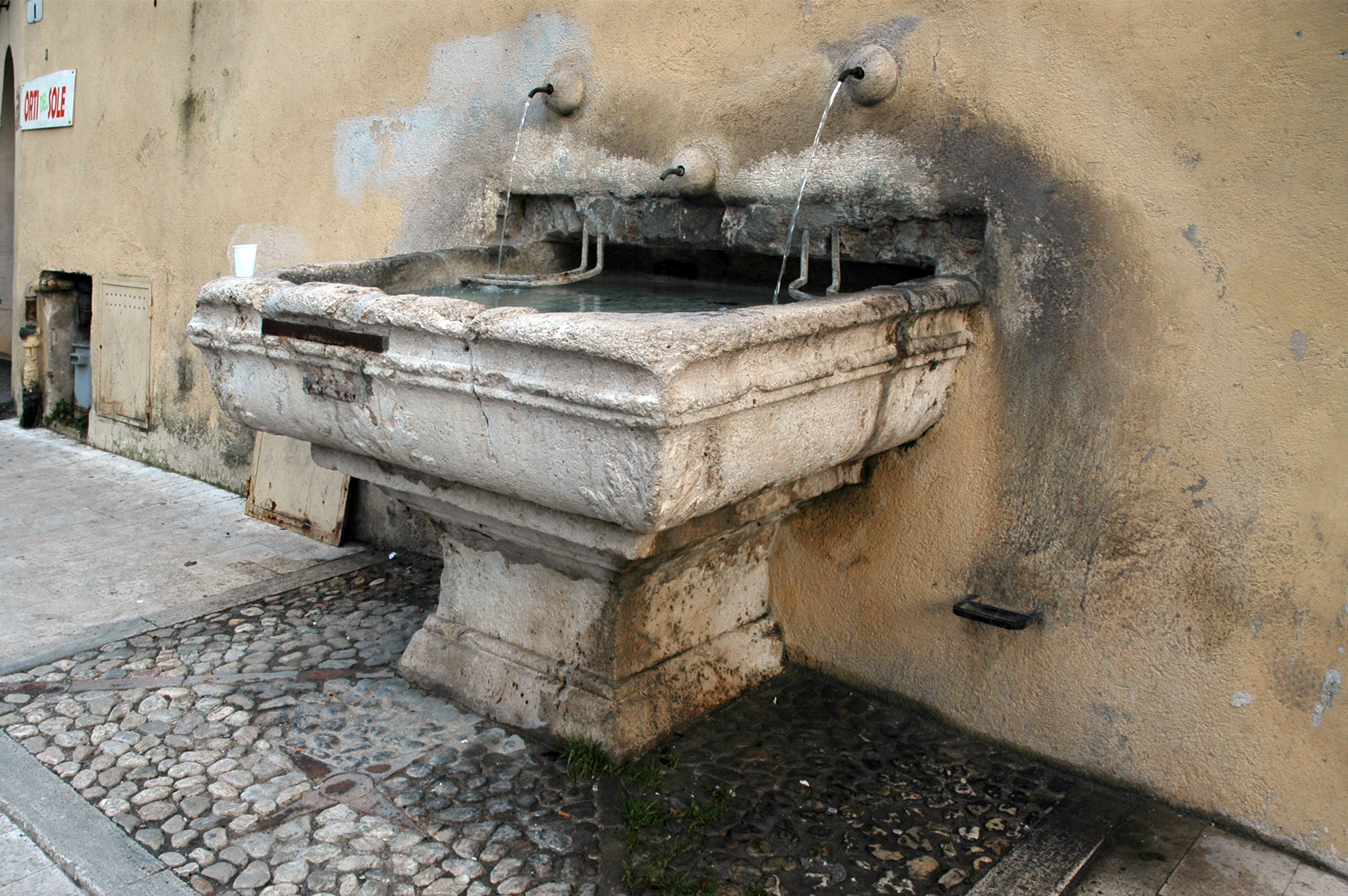 Fontana di Via San Carlo Appena fuori Porta Monterone, a pochi metri dalle mura di Spoleto, una fontana con tre cannelle ed una vasta vasca, decorata con gigli. Situata lungo il percorso dell’antica via Flaminia, ad uno degli accessi di Spoleto e presso una stazione di posta, la forma, bassa e allargata, permetteva di abbeverarsi anche ai cavalli. Risale al 1549.